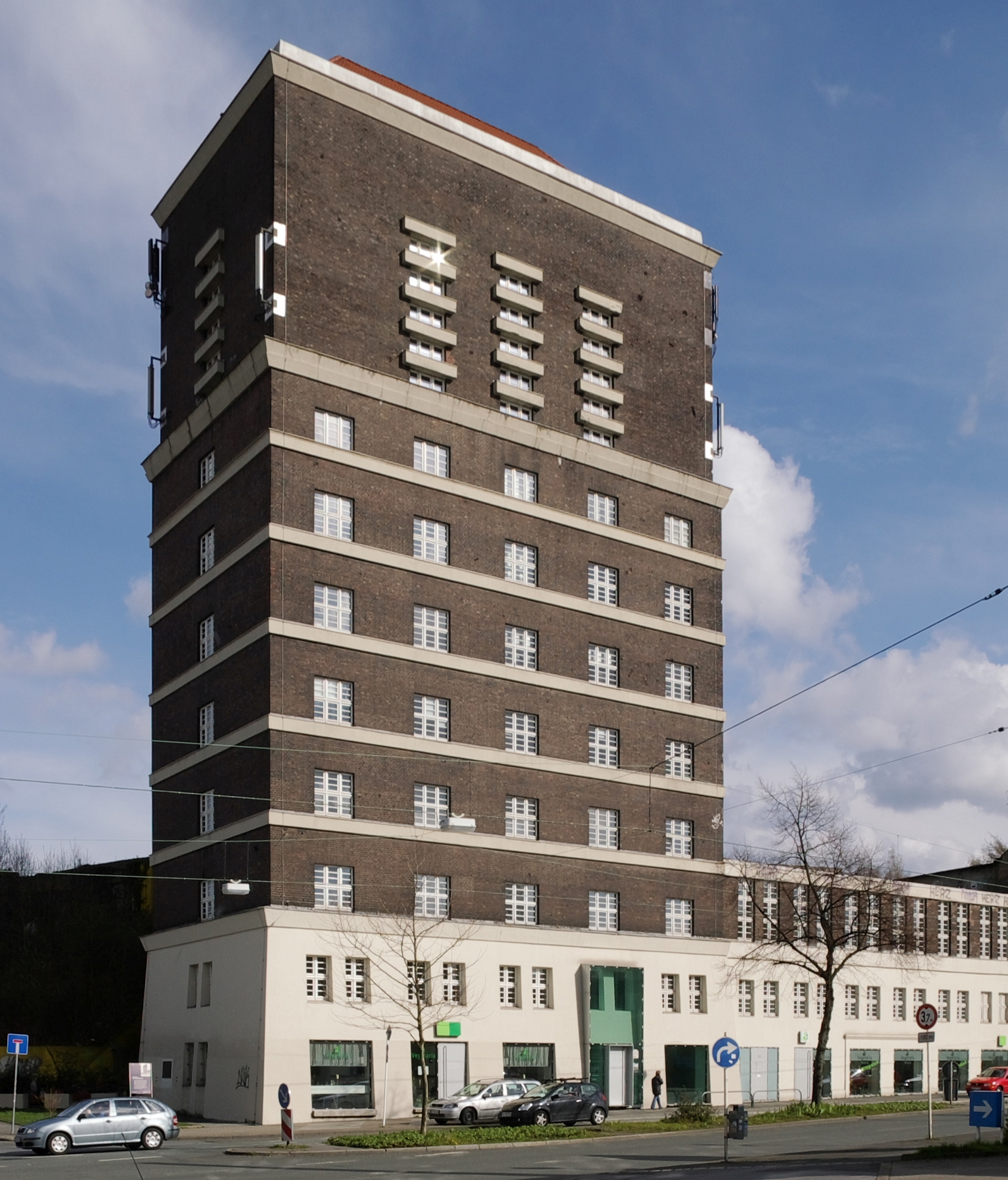 Umgenutzter ehemaliger Wasserturm Heiliger Weg (51.509365,7.474713